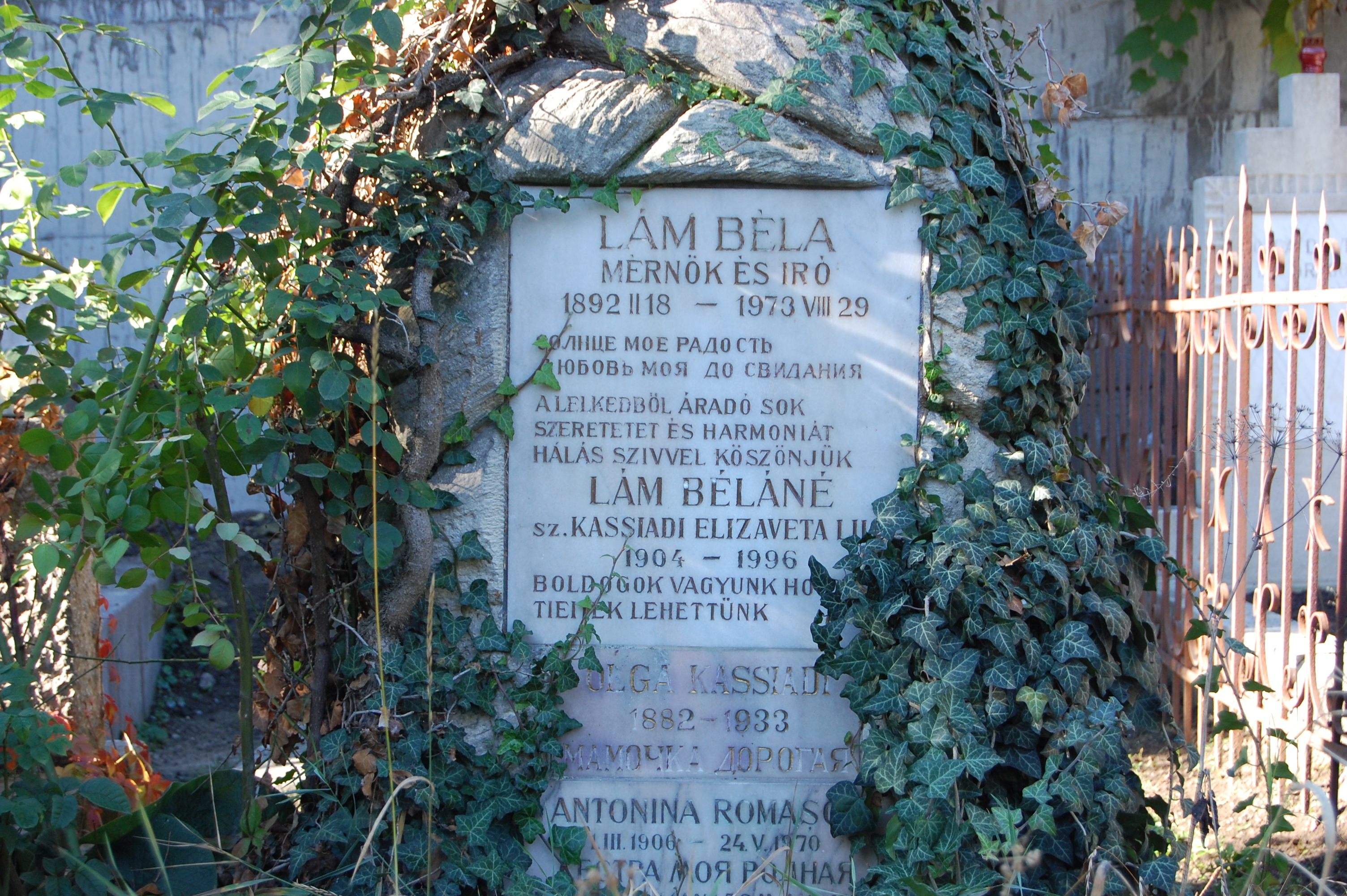 Lám Béla mérnök, író sírja a Házsongárdi temetőben